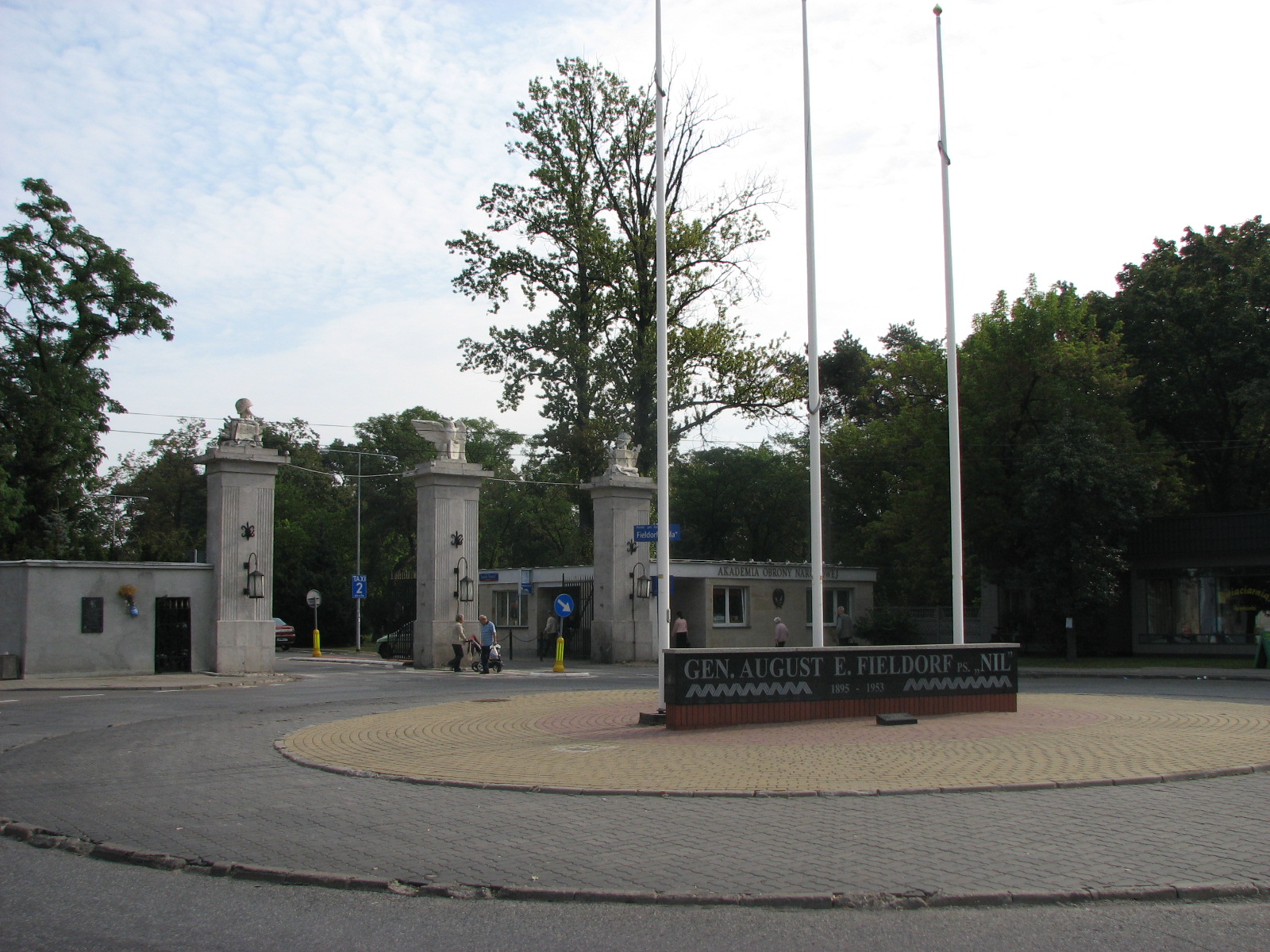 Brama zabytkowa AON